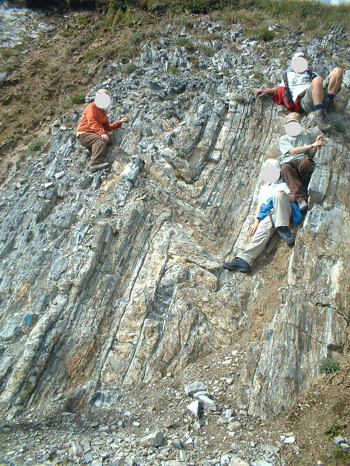 Kink band in Formazione di Moena - affioramento sul Dos Capel - Predazzo (Tn).